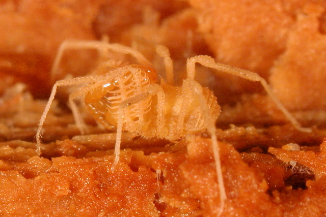 Fumontana deprehendor from Appalachia.